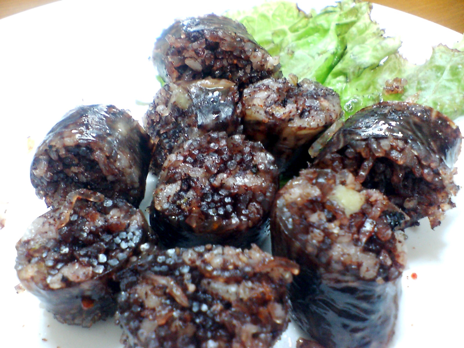 韓国料理店”多福” に行ってきました。焼き肉屋じゃないですよ。 [地図を表示]